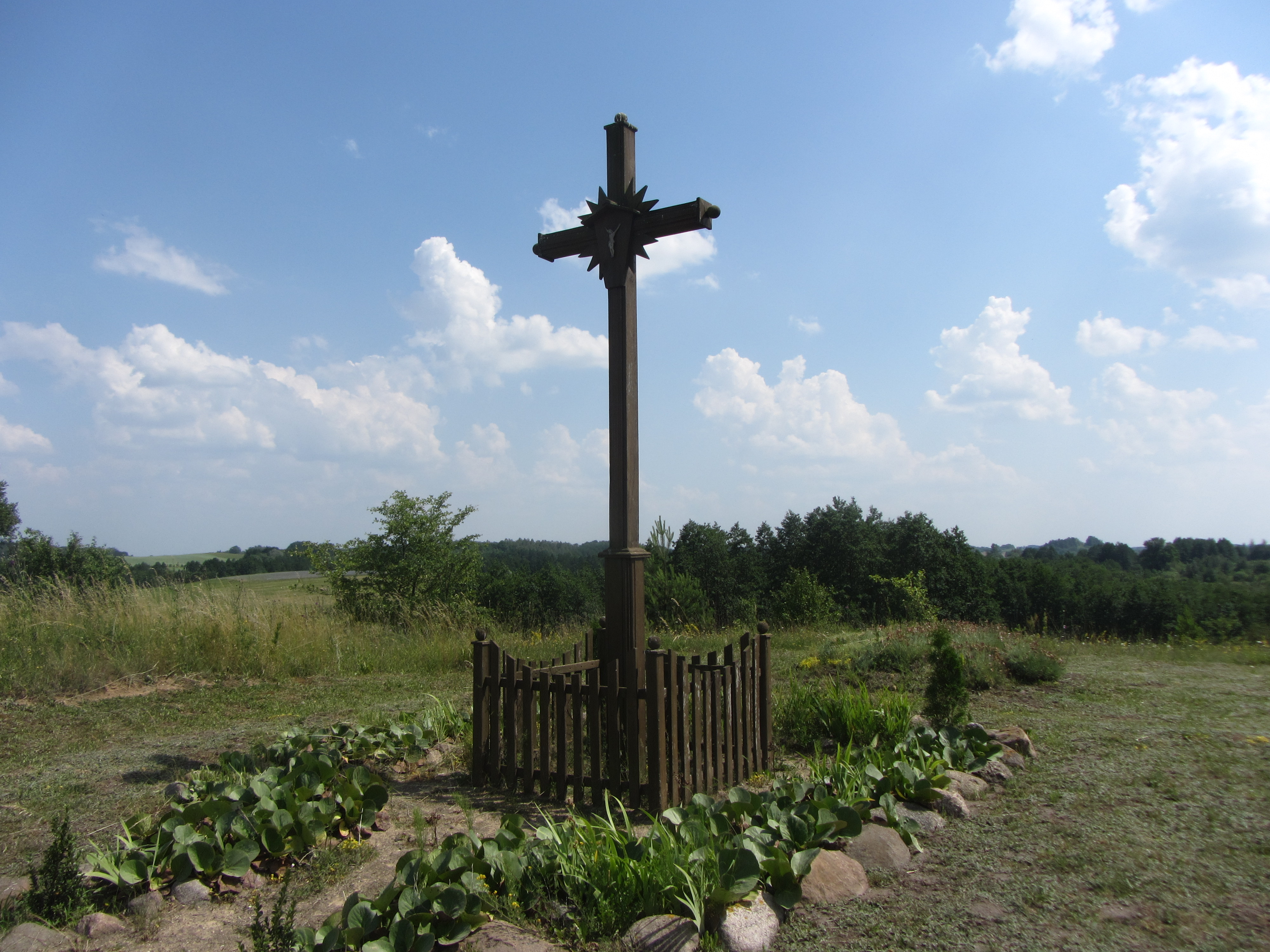 Teizų sen., Lithuania